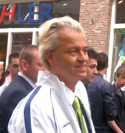 Geert Wilders op campagne in zwolle